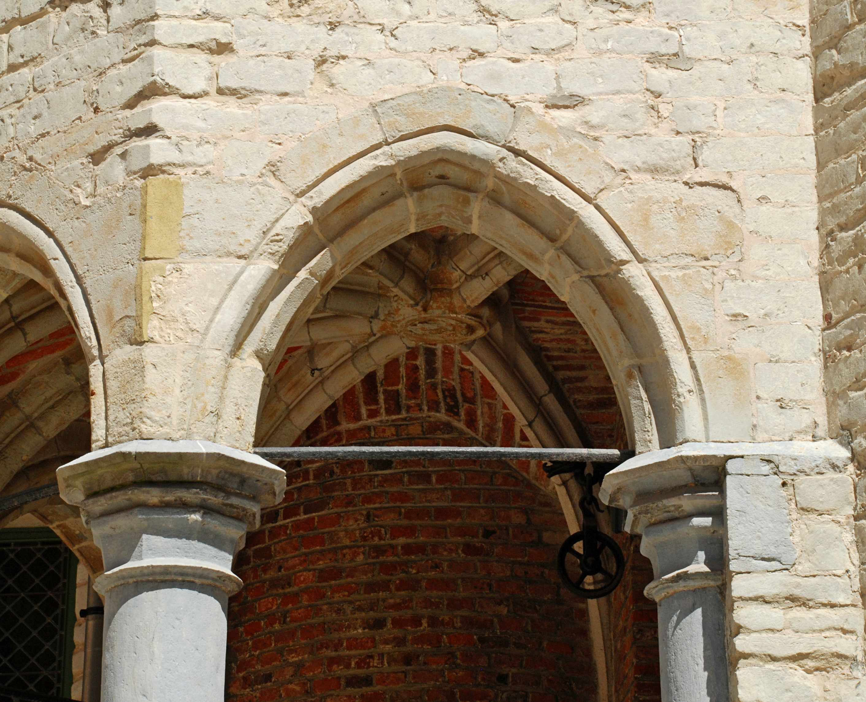 Belgique - Gand - Maison de l'Arrière-Faucille (14e-15e-16e siècles)